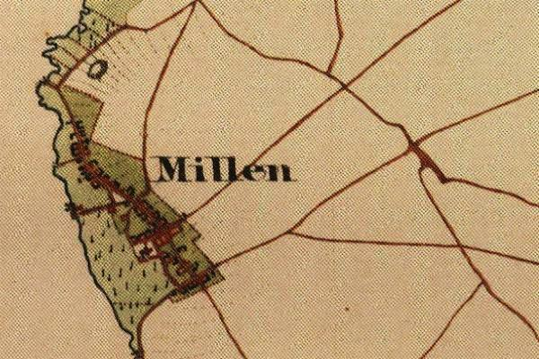 Preußische Kartenaufnahme 1846 - Uraufnahme